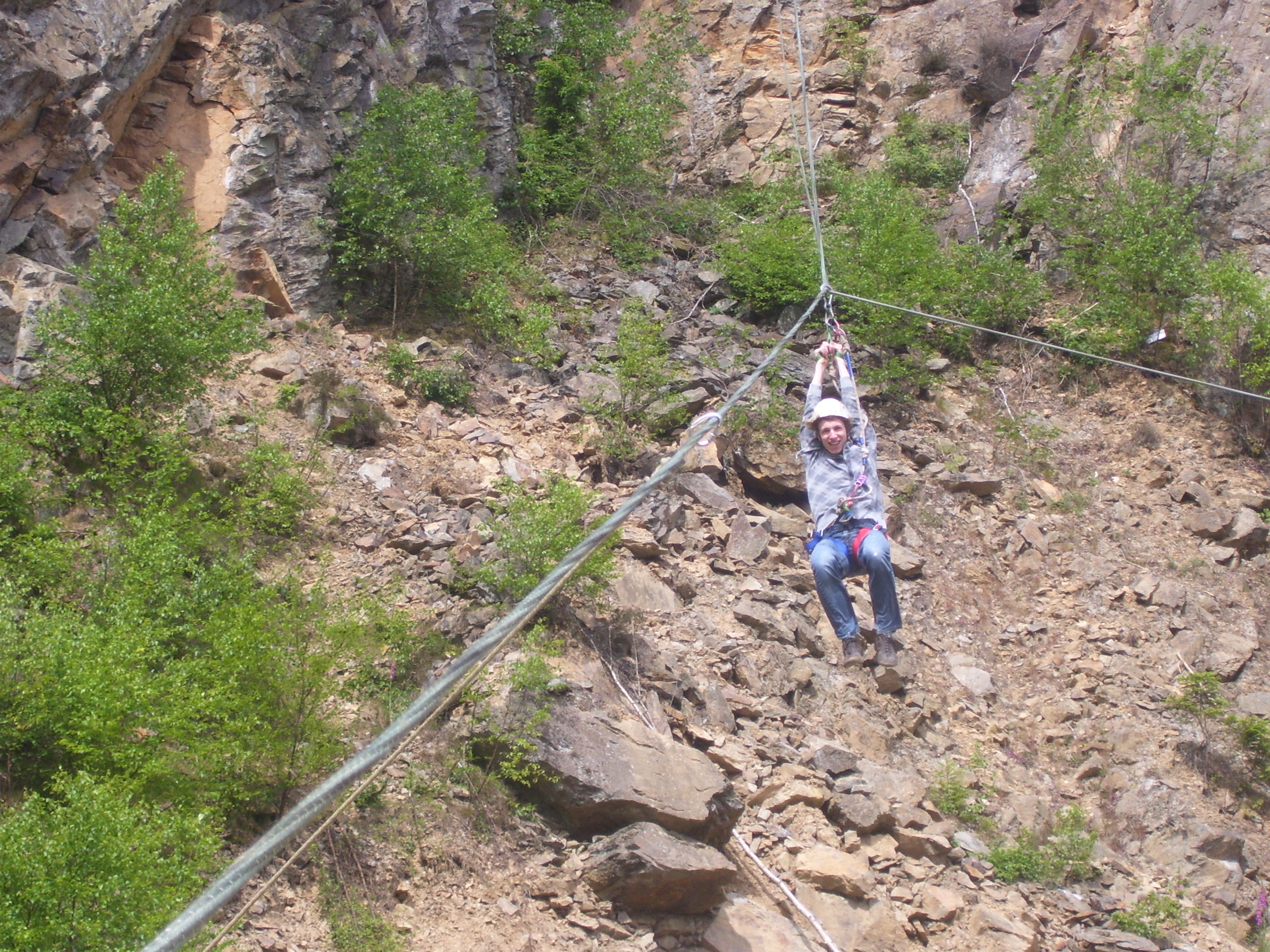 Descente en death-ride au Parc Aventure Bouillon en Belgique le long d'une corde de 90m à une vitesse moyenne de 60 km/h